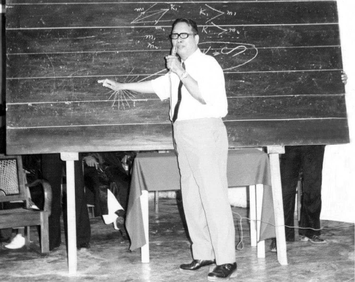 Prof DR Kadirun Yahya dalam forum ilmiah (foto dokumentasi tahun 1980-an)